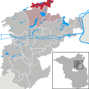 Friedrichswalde in Brandenburg (Country) - District Barnim